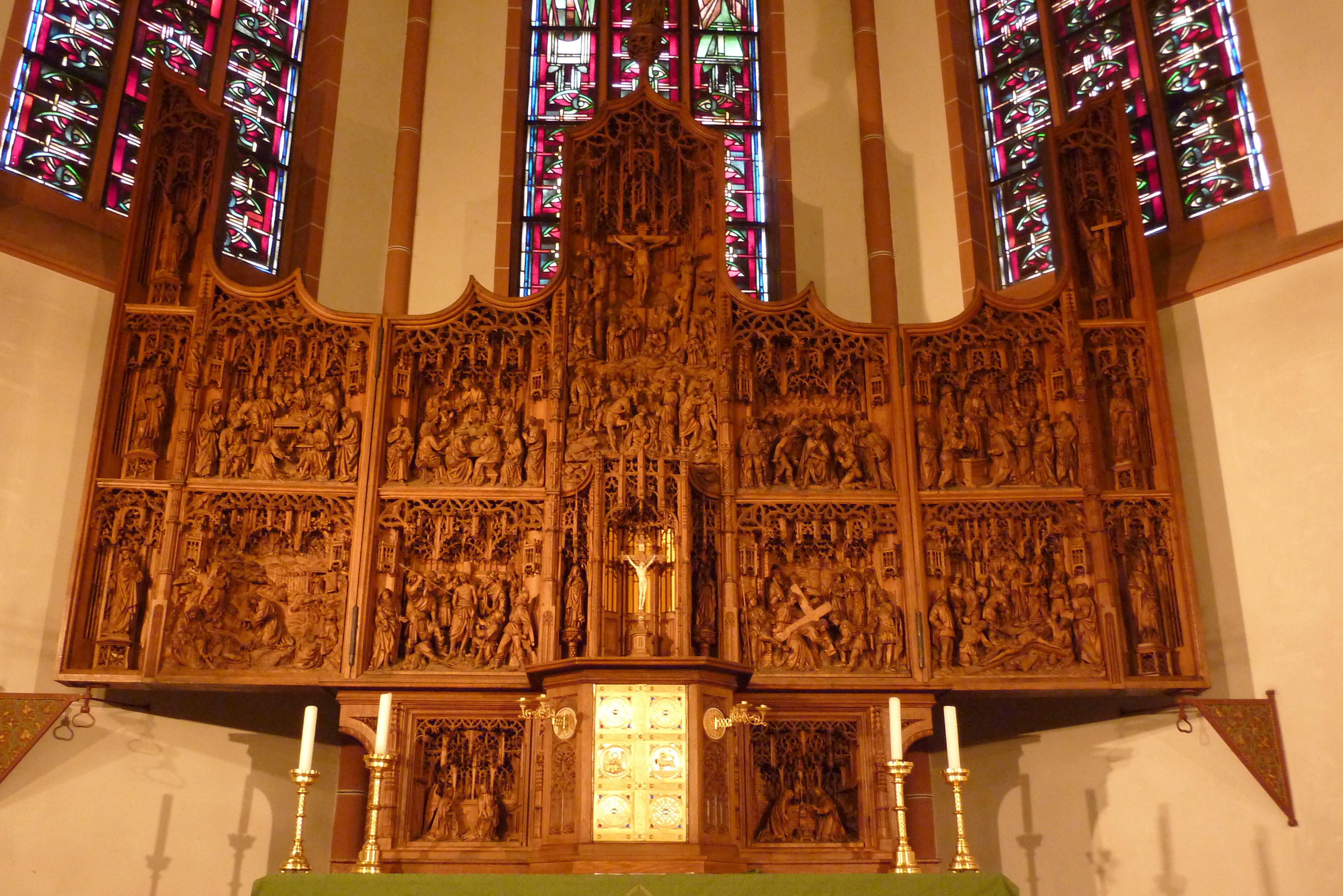 Schnitzalatr in der katholischen Pfarrkirche St. Lambertus in Bedburg